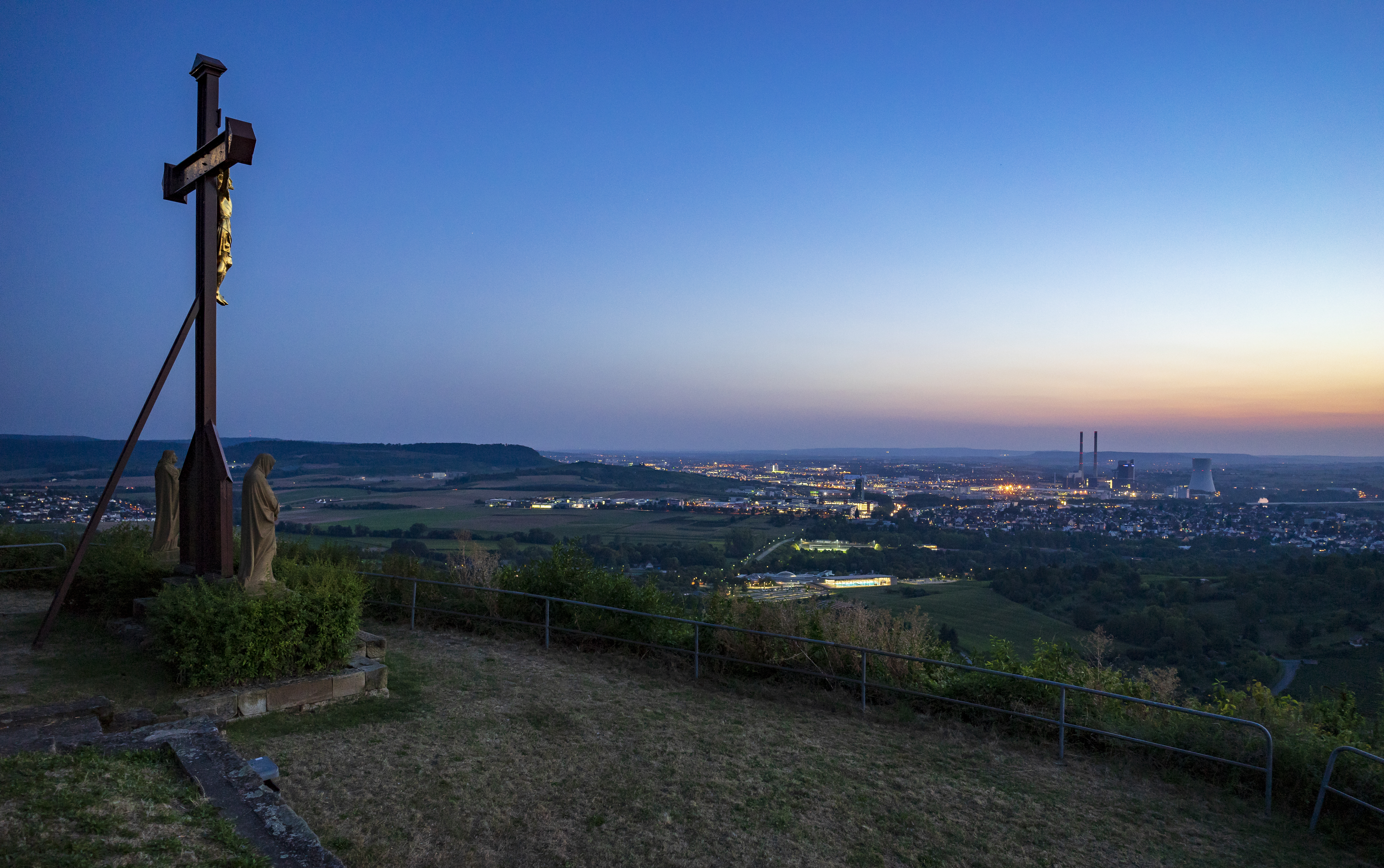 Neckarsulm: Blick vom Gipfel des Scheuerbergs auf das Gipfelkreuz und nach Süd-Südwesten auf Heilbronn und Teile von Neckarsulm. Rechts der Bildmitte das Kraftwerk Heilbronn.